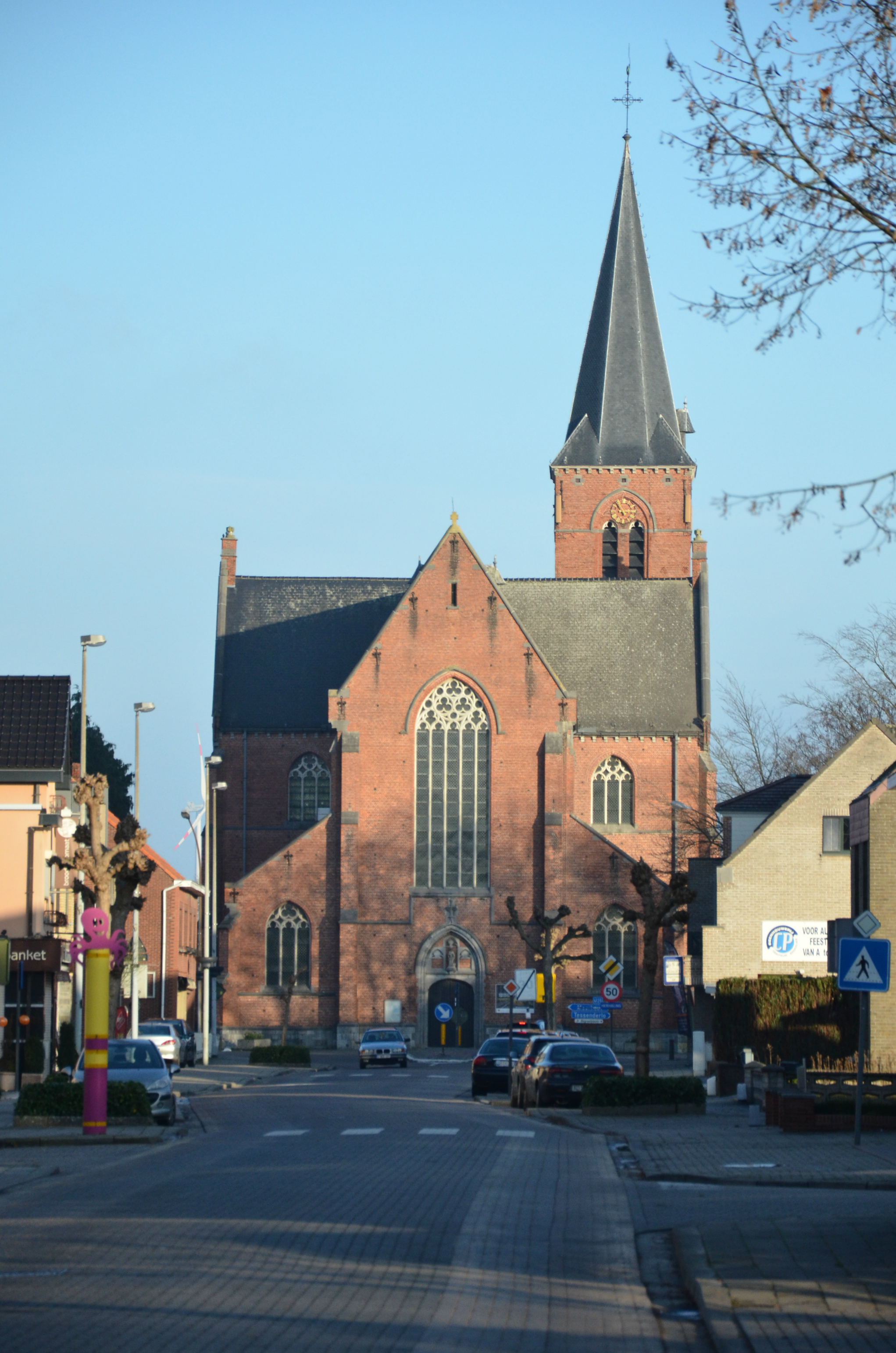 Parochiekerk Sint-Niklaas, Vorst (Laakdal)